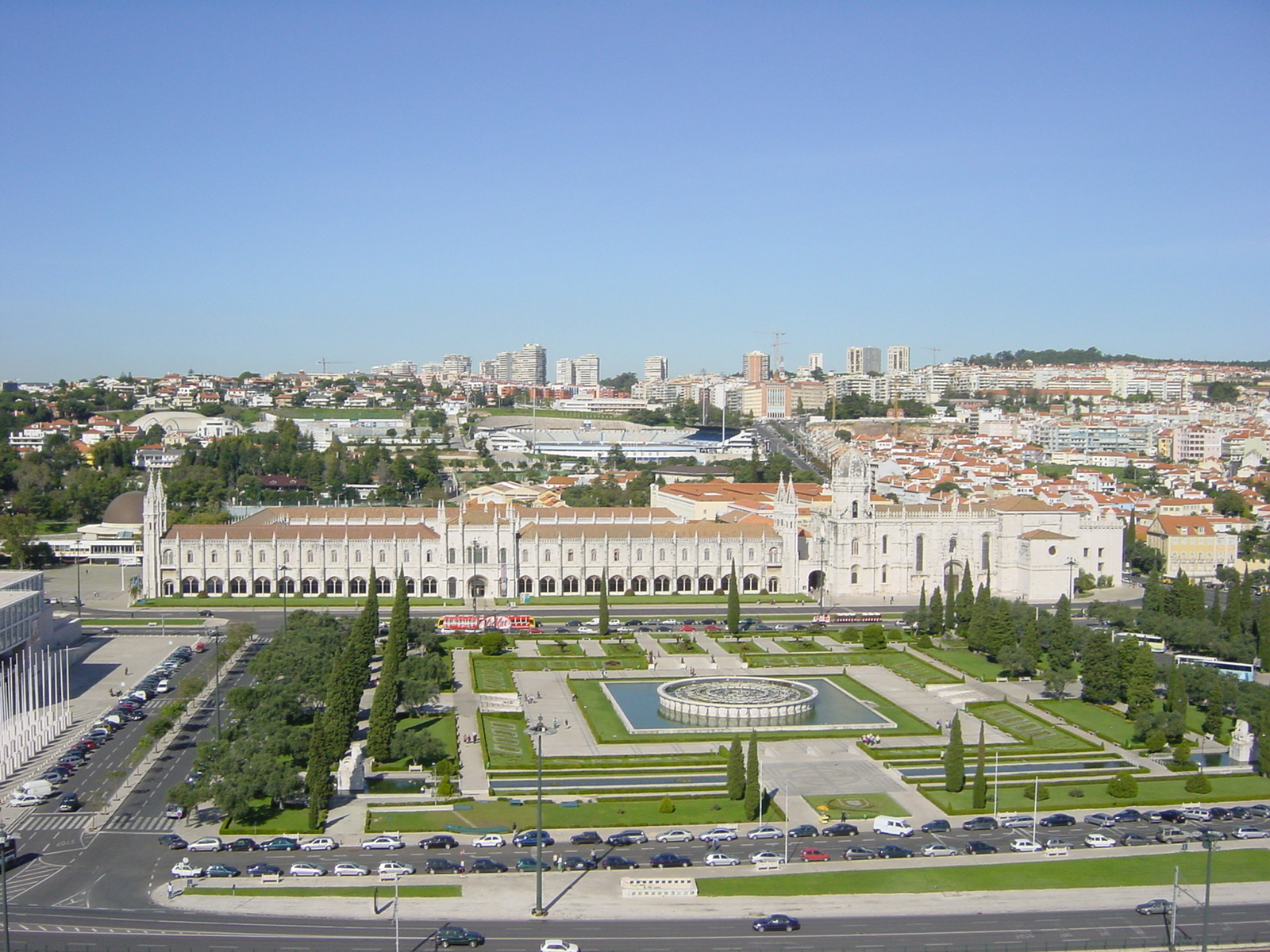 Praça do Império e Mosteiro dos Jerónimos